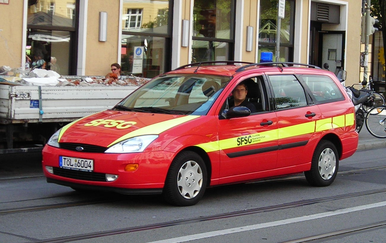 Einsatzfahrzeug der Staatlichen Feuerwehrschule Geretsried, Krs. Bad Tölz-Wolfratshausen, Bayern.